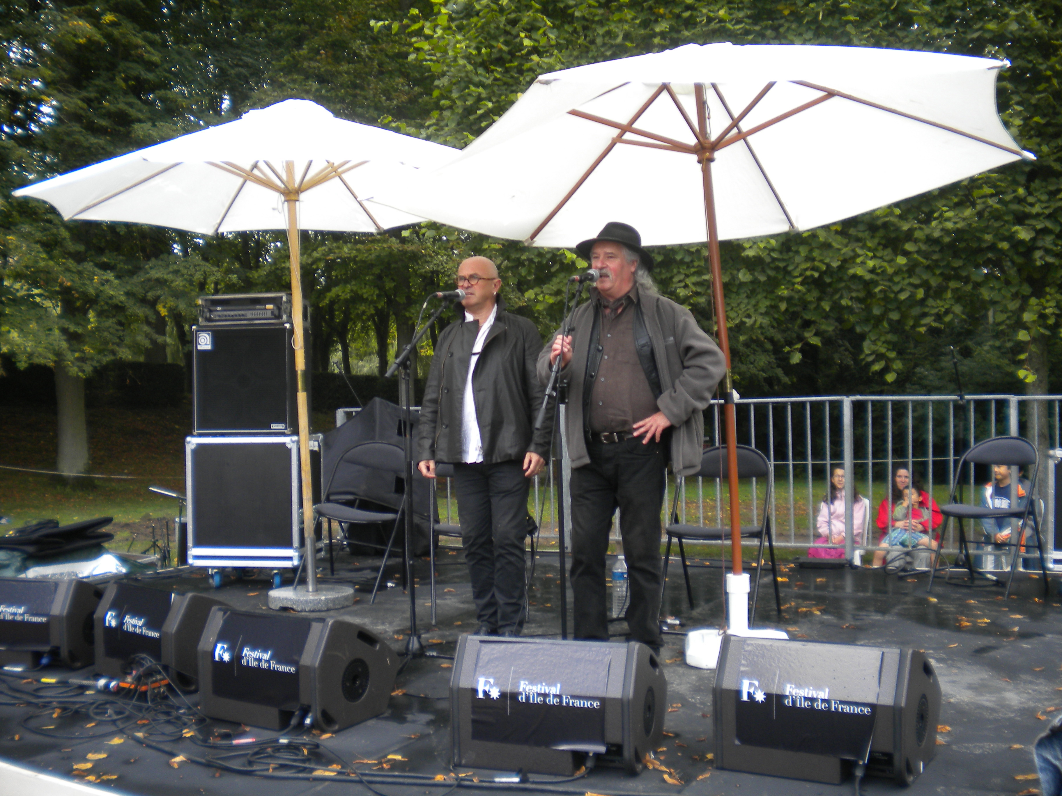 Yann-Fañch Kemener Erik Marchand 2011 09 04 Villarceaux